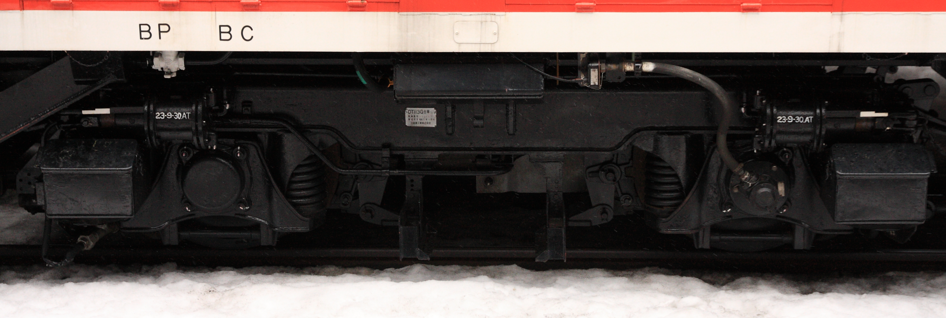 JR貨物DD14形ディーゼル機関車332号機のDT113G台車